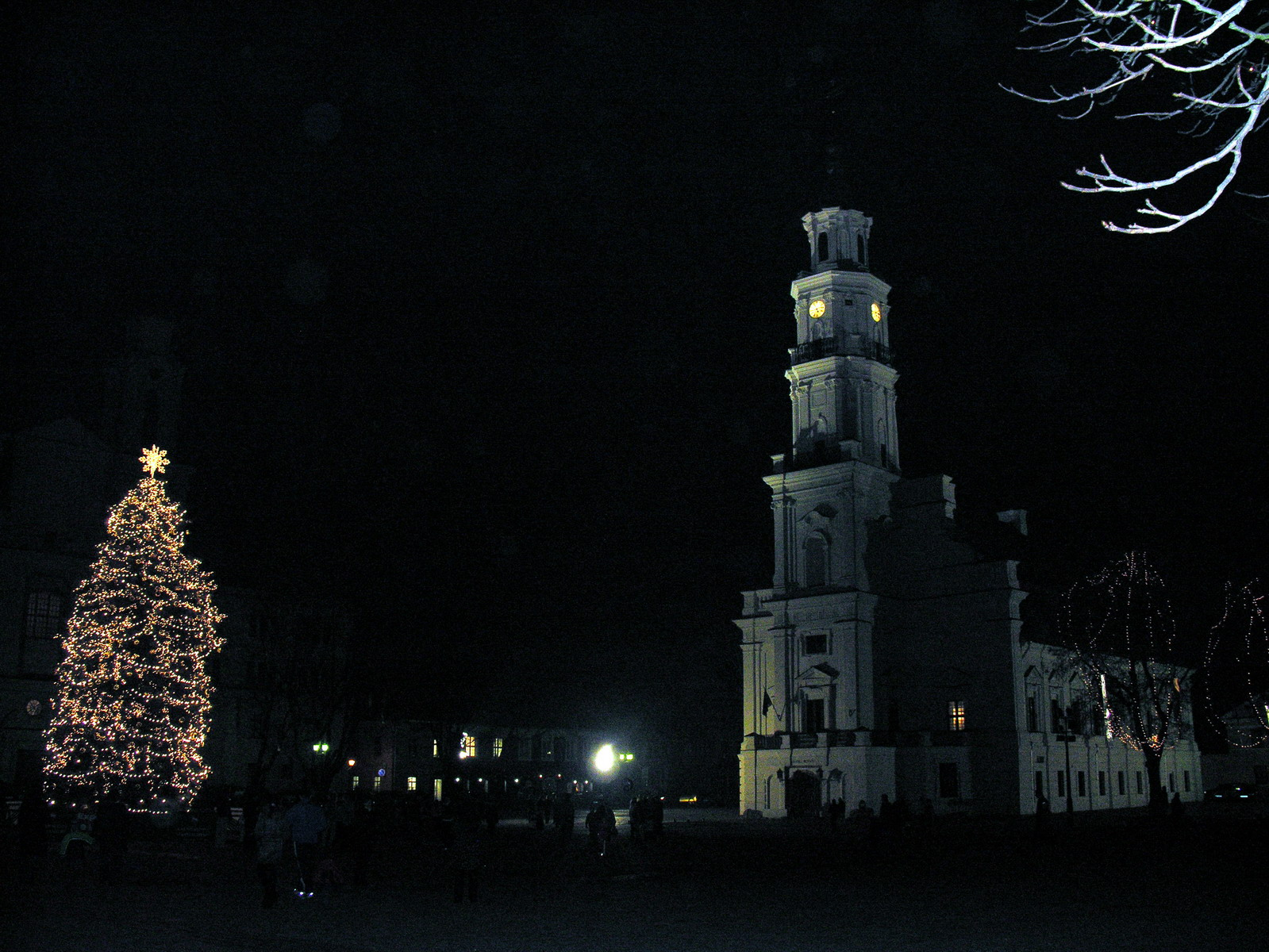 Žemaitėška: Kaunas, Ruotošies aikštie, 2006 m. pabaiguo, 2006 m. groudė 3 d.